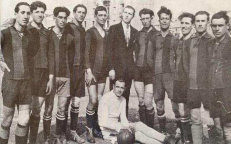 F.C. Vado in 1922. La formazione del Vado vincitore della Coppa Italia. In piedi, da sinistra: Esposto, V. F. Levratto, Negro, E. Romano, L. Babboni, Ferrando (Presidente), A. Cabiati, G. B. Babboni, Roletti, Marchese e Masio. Accosciato: A. Babboni.